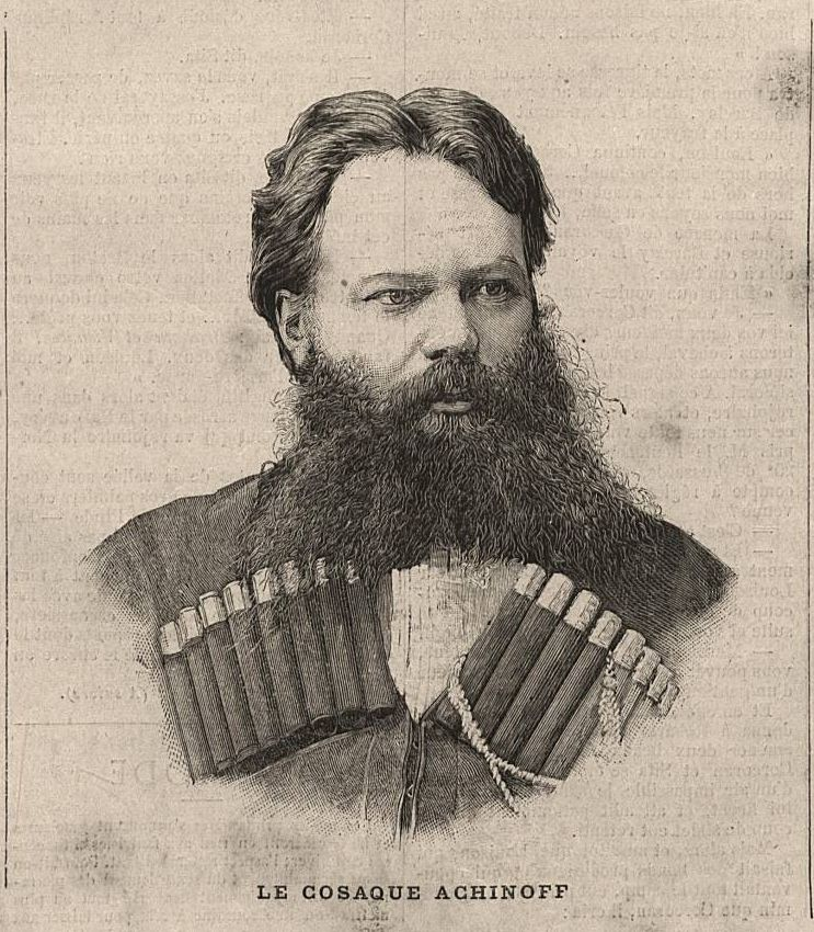 Le cosaque Achinoff